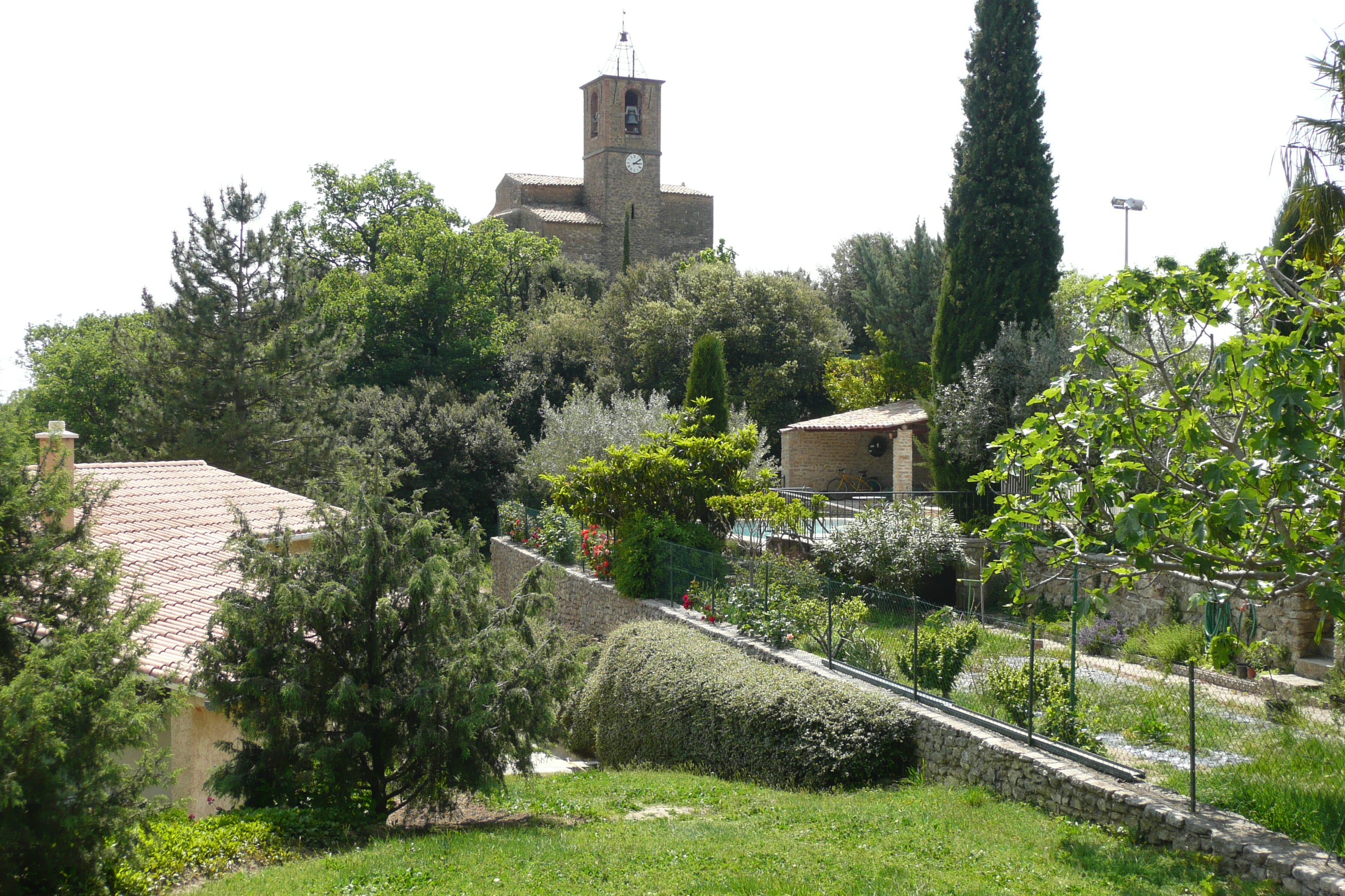 Mérindol-les-Oliviers (Drôme, France). Église Notre-Dame de Porporières, façade nord.